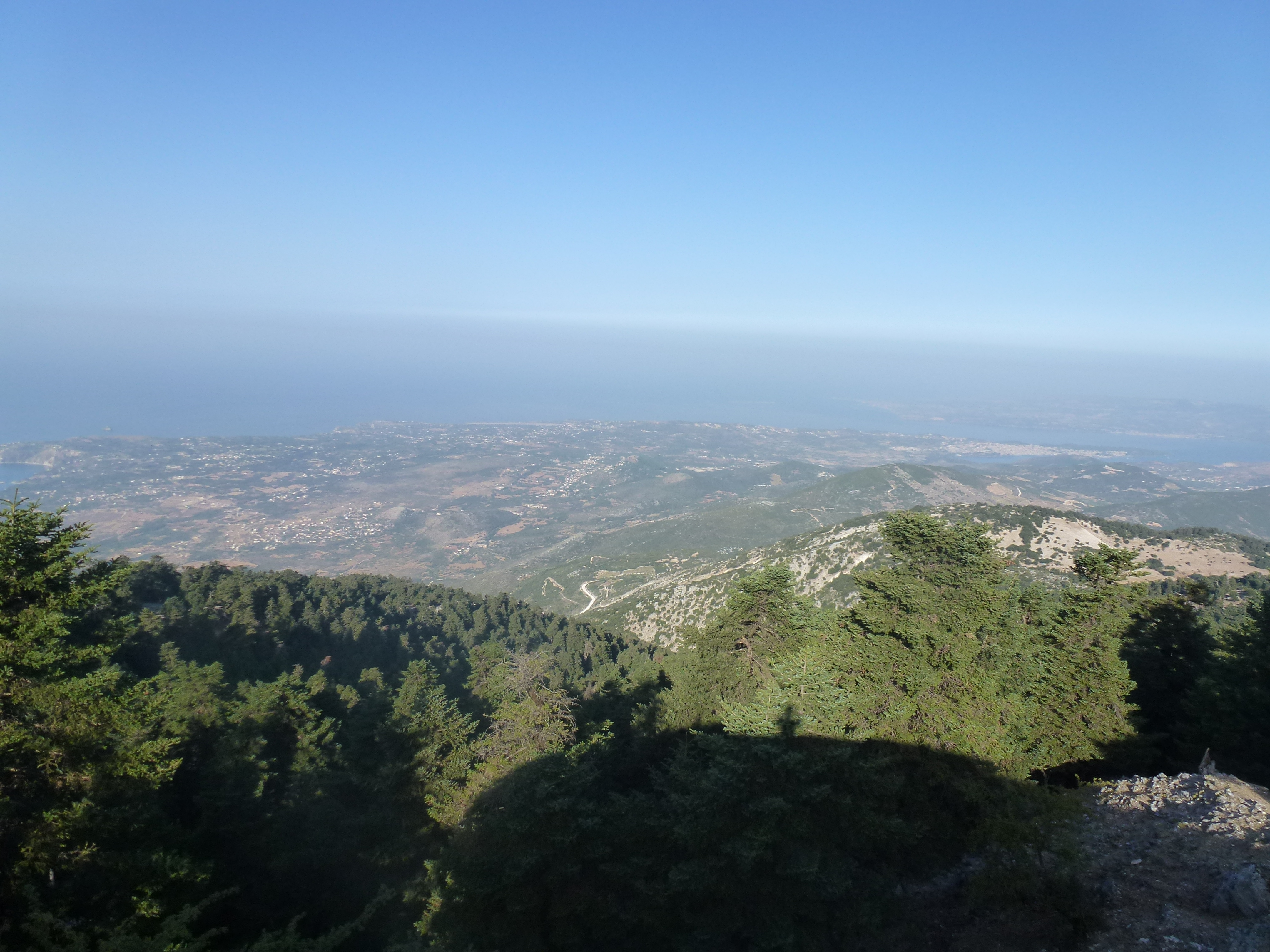 Το δάσος της κεφαλληναικής Ελάτης του Εθνικού Δρυμού Αίνου